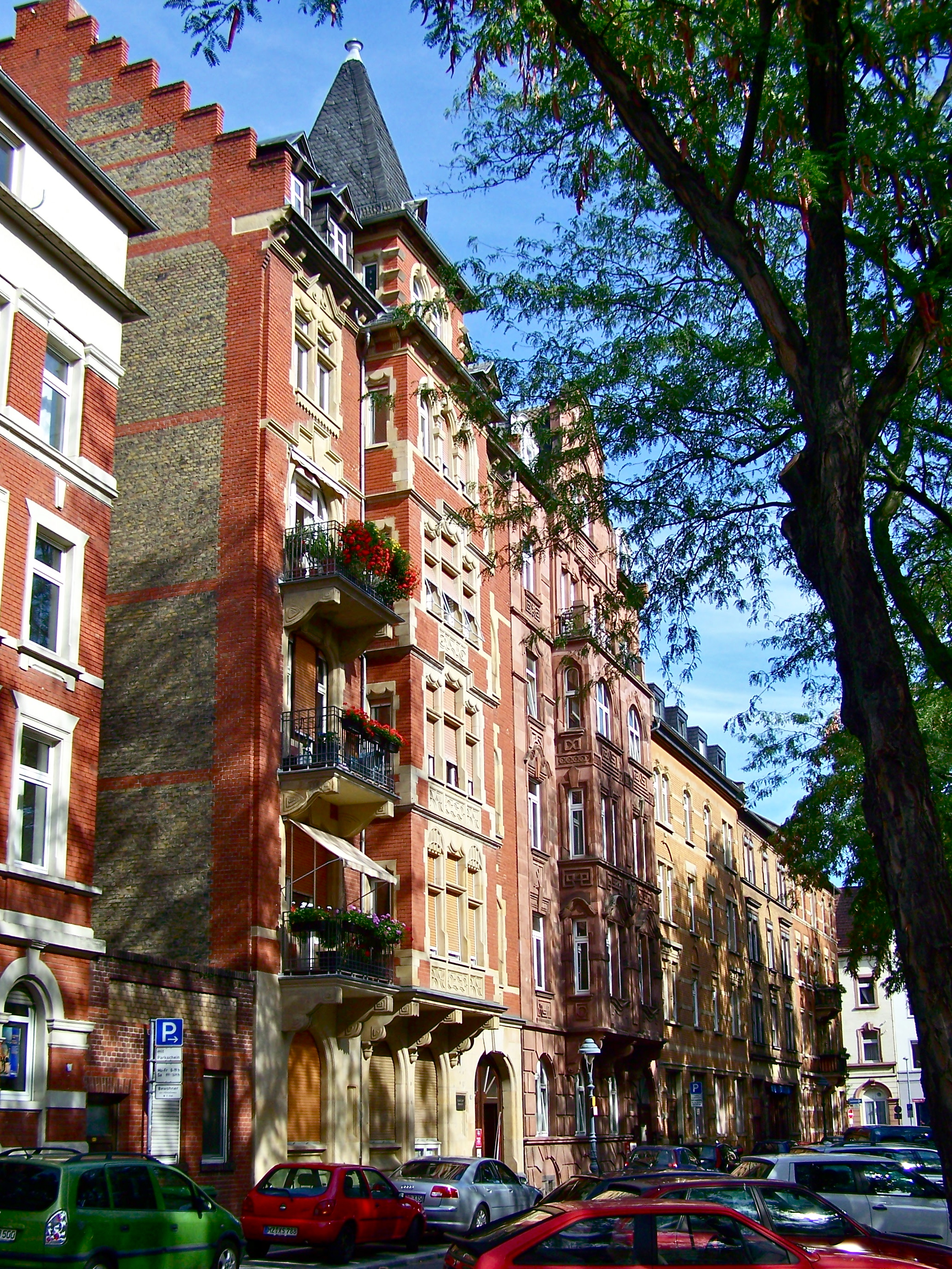 Denkmalgeschützte Bebauung am Gartenfeldplatz in Mainz. Teil einer Denkmalzone.